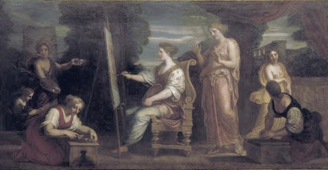 LALA DE CYZIQUE CULTIVANT LA PEINTURE ; CESISENE CULTIVANT LA PEINTURE ; Salon : Salon des Nobles, Grands appartements du Château de Versailles Emplacement : voussure ; sud